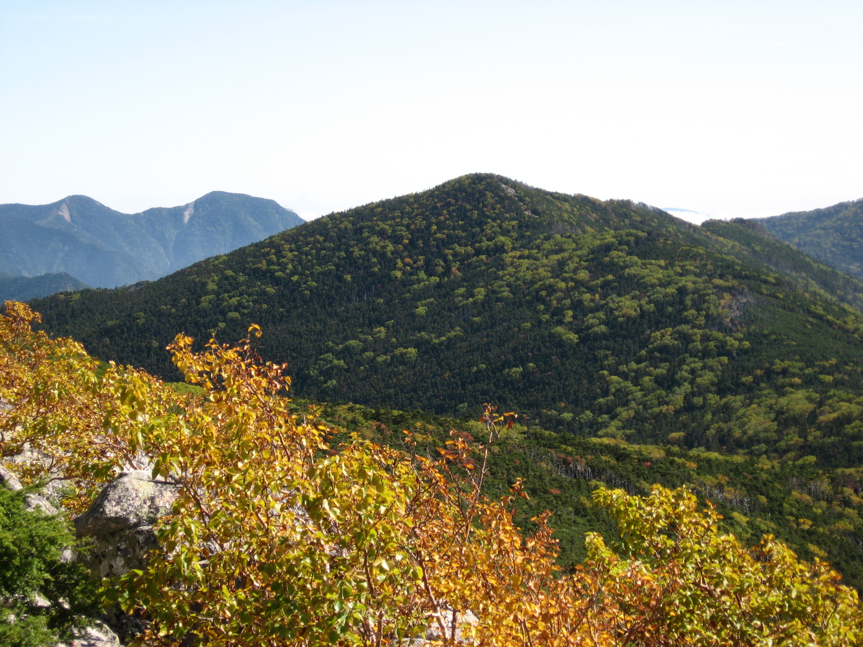 金峰山山頂より望む朝日岳